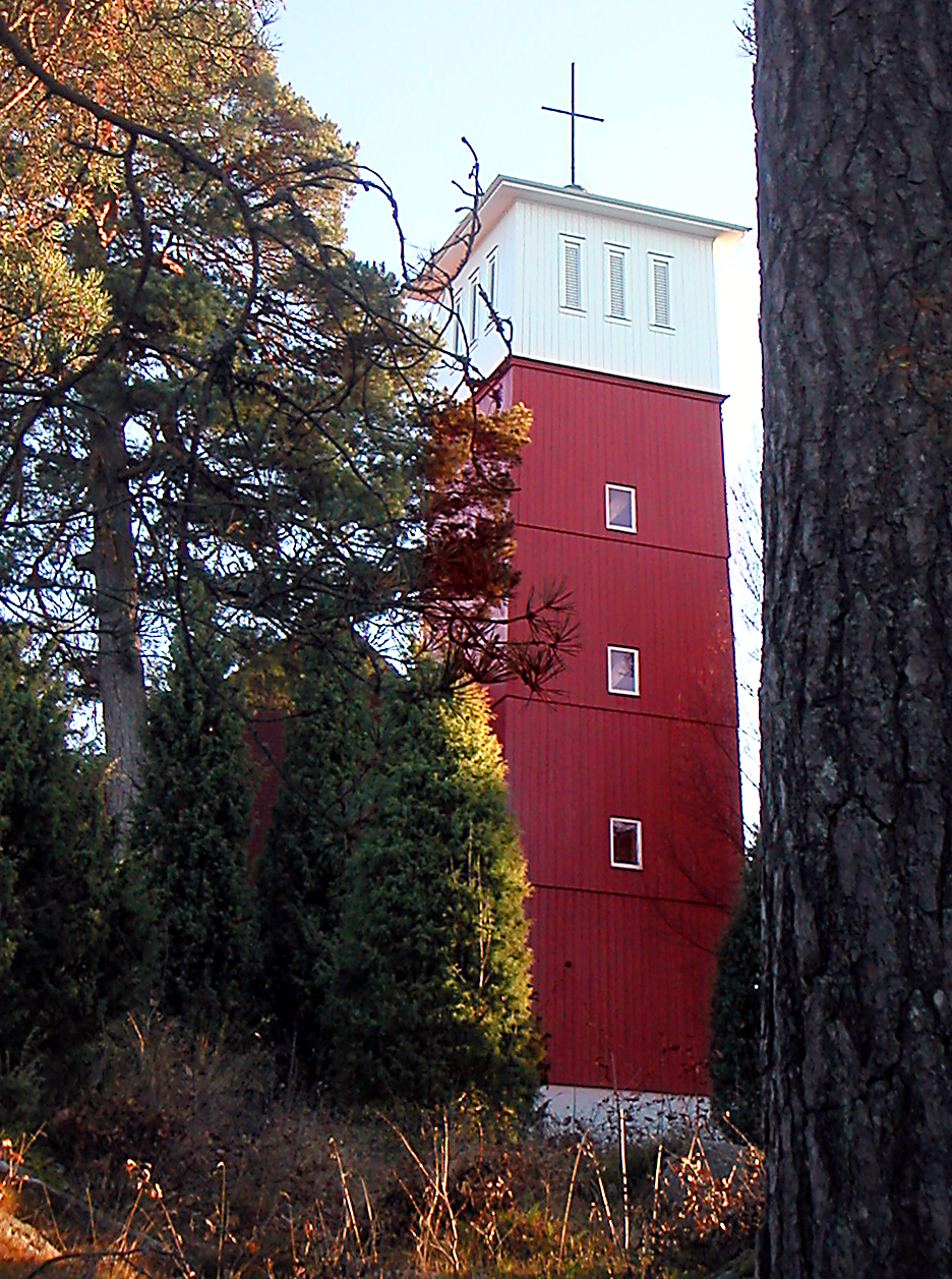 Åh kyrka vid Åh stiftsgård utanför Ljungskile i Uddevalla kommun.